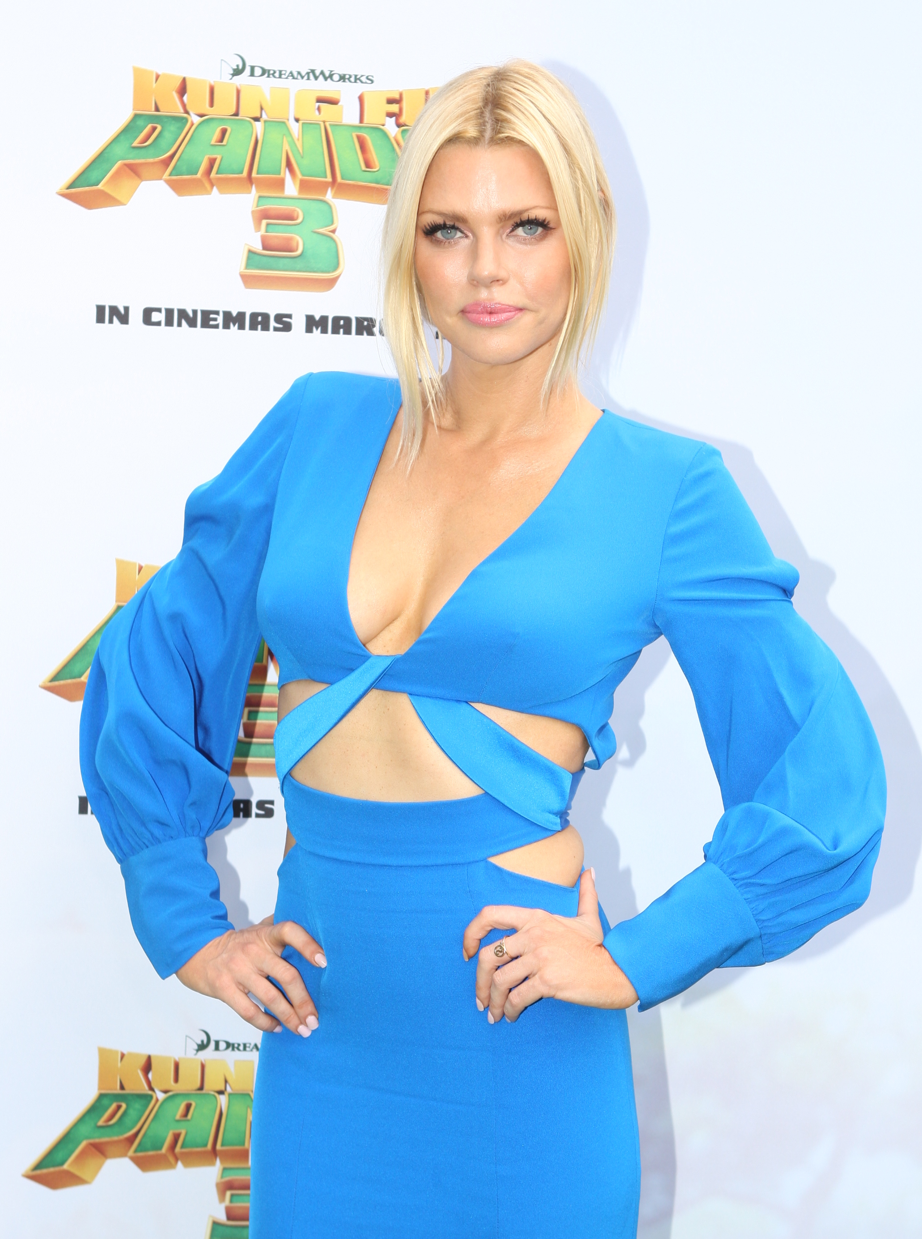 Sophie Monk